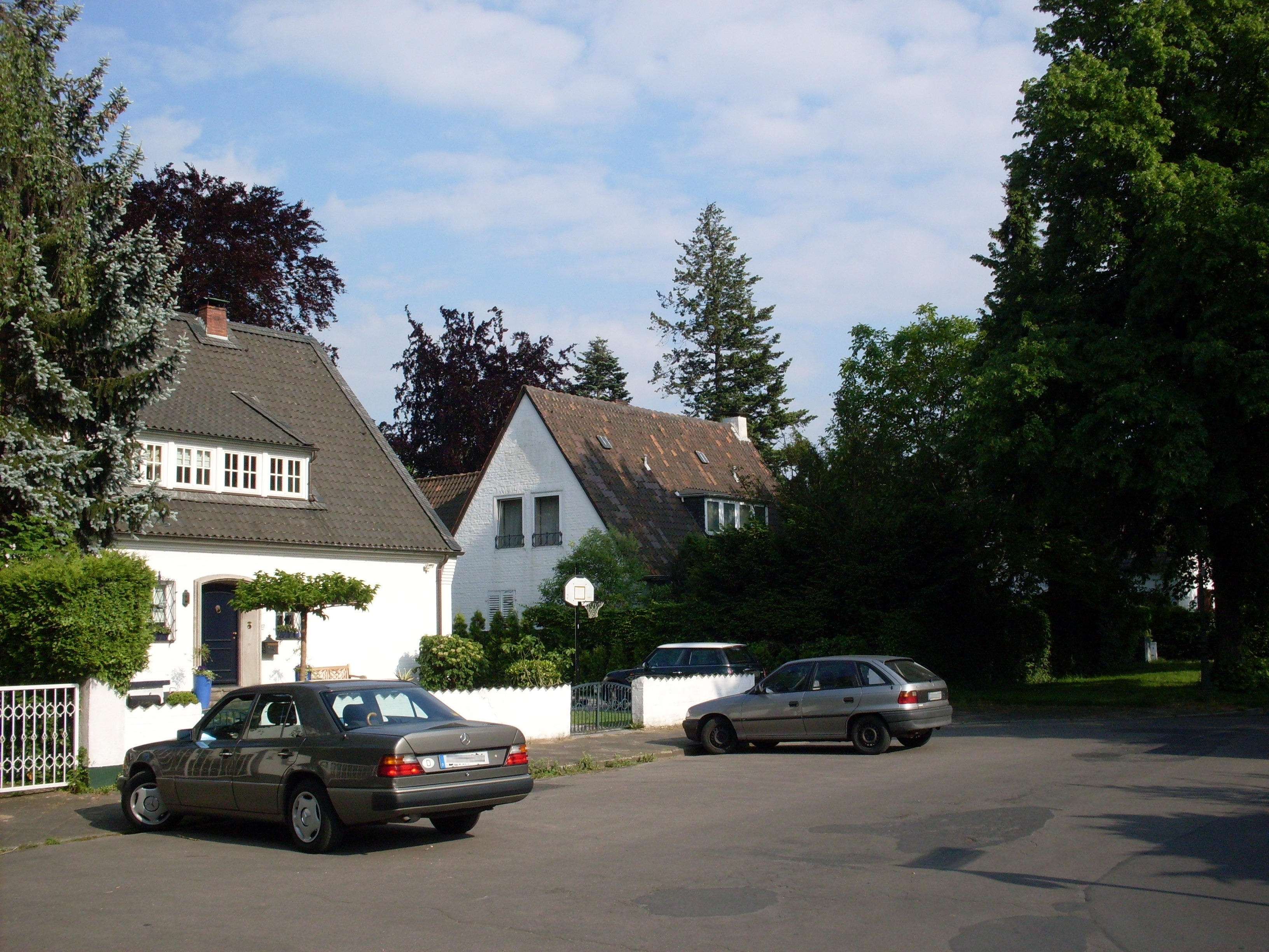 Düsseldorf-Stockum Wohnhäuser in Messenähe